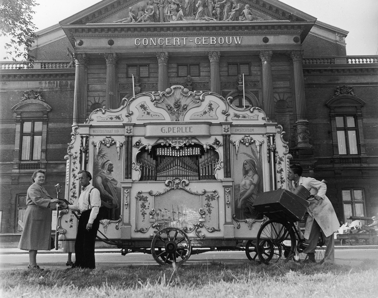 Draaiorgel "de Arabier" van G. Perlee voor het Concertgebouw, slagersjongen kijkt toe, Museumplein, Amsterdam, 15 oktober 1951 Foto Ben van Meerendonk / AHF, collectie IISG, Amsterdam